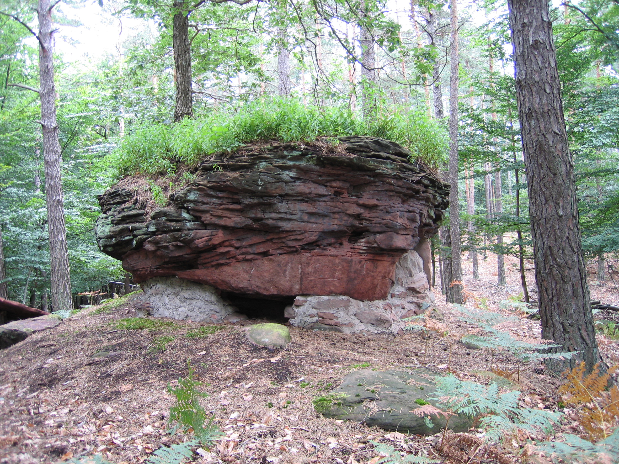 Waldabteilung Schorlenberg, Bergspitze, Felschen, Höhe üner N.N.406 m